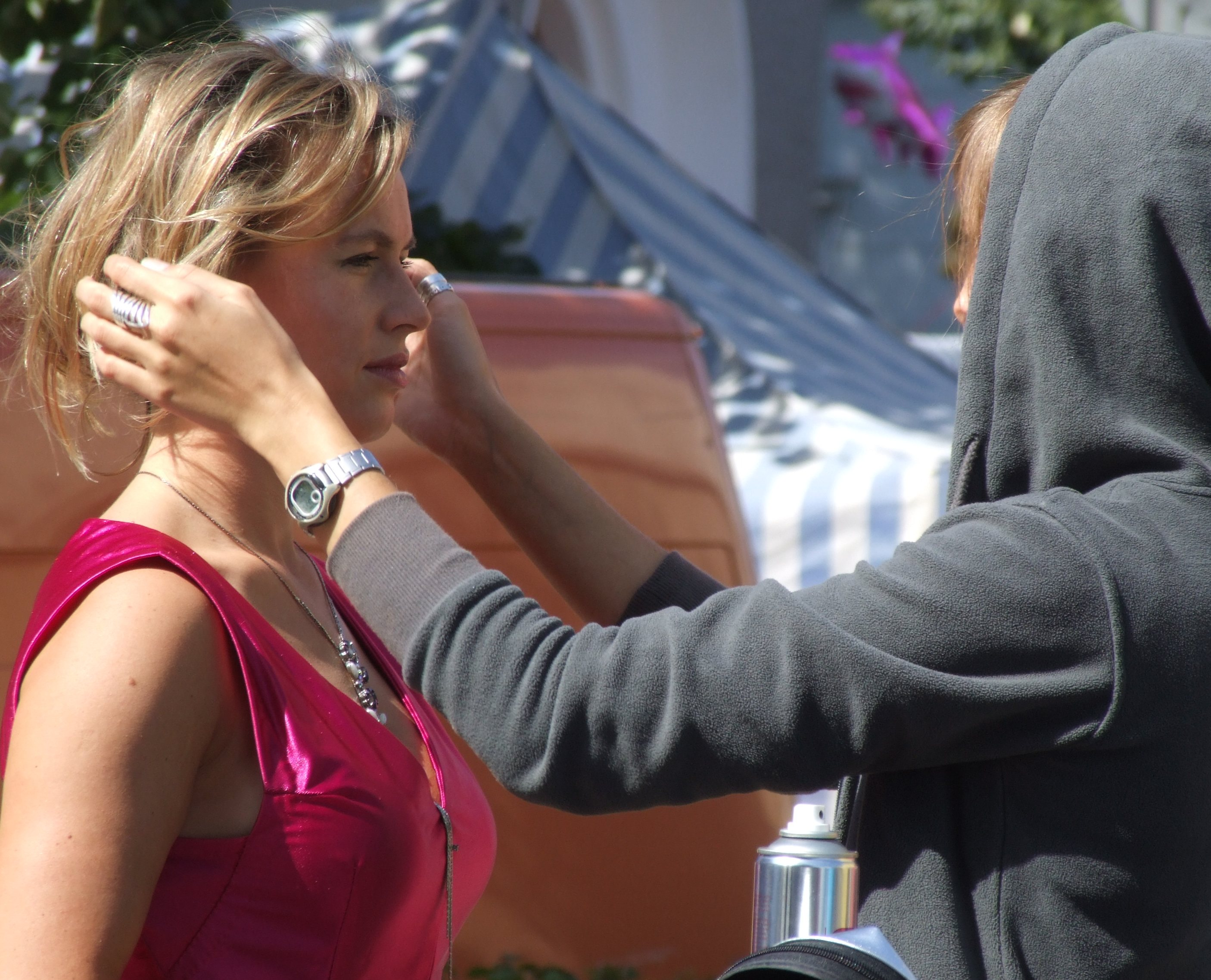 Na planie filmu "Zamknięci w celuloidzie", Zielona Góra 2006